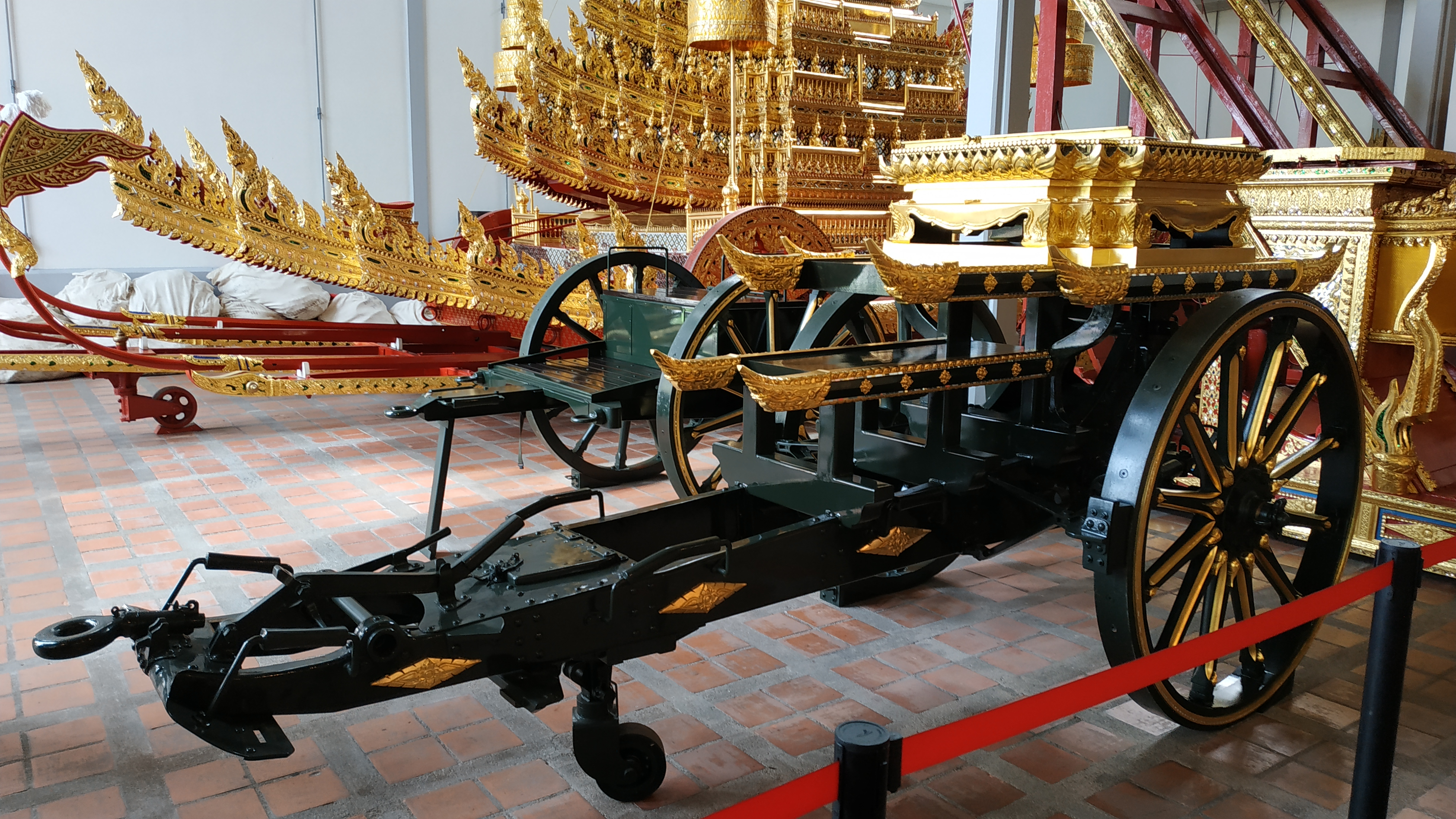 1 ในราชรถปืนใหญ่จำนวน 2 องค์สำหรับใช้อัญเชิญพระโกศพระบรมศพ พระบาทสมเด็จพระปรมินทรมหาภูมิพลอดุลยเดช สยามินทราธิราช บรมนาถบพิตร จัดแสดงที่พิพิธภัณฑสถานแห่งชาติ พระนคร กรุงเทพฯ ราชรถปืนใหญ่เหล่านี้ ใช้กำลังพลฉุดชักและควบคุมราชรถรวม 40 คน ประกอบด้วยส่วนรถรางปืน (limber) ซึ่งเป็นตัวรถหลักที่ใช้ประดิษฐานพระโกศ และส่วนรถบรรทุกกระสุน (caisson) ซึ่งจะติดตั้งอยู่ตอนหน้าของรถปืนใหญ่เมื่อมีการใช้งาน ส่วนของรางปืนนั้นดัดแปลงจากรถรางปืนของปืนใหญ่ภูเขาแบบ 51 (ป.51-1) ซึ่งผลิตโดยบริษัทกรุปป์ ประเทศเยอรมนี และกองทัพบกไทยได้บรรจุเข้าประจำการเมื่อ พ.ศ. 2451 (ชื่อเรียกโดยทั่วไปในต่างประเทศคือ Krupp 7.5 cm Model 1903) ส่วนรถบรรทุกกระสุนปืนนั้นต้องสร้างขึ้นใหม่ทั้งหมดเนื่องจากไม่มีของเดิมเหลืออยู่ ทั้งนี้ ดำเนินการโดย กรมสรรพาวุธทหารบก กองทัพบก ส่วนการตกแต่งด้านประณีตศิลป์นั้น ดำเนินการโดยสำนักช่างสิบหมู่ กรมศิลปากร